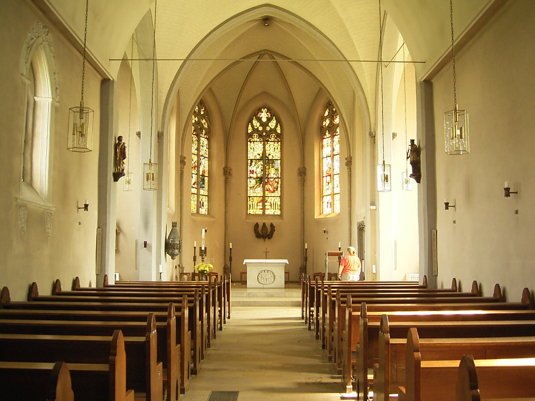 Sankt Johann Baptist in Bergisch Gladbach-Herrenstrunden